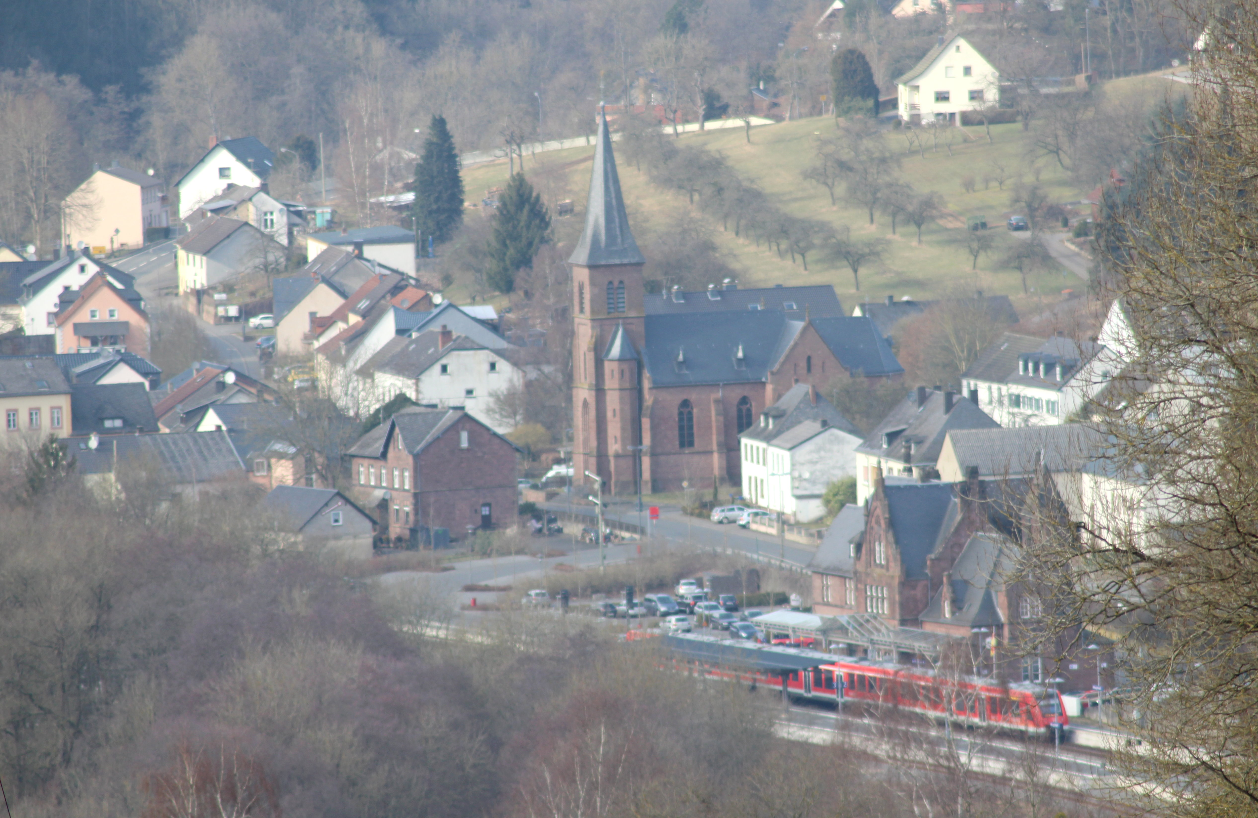 54634 Erdorf, An der K87. Panoramablick auf Erdorf. Aufnahme von 2018.